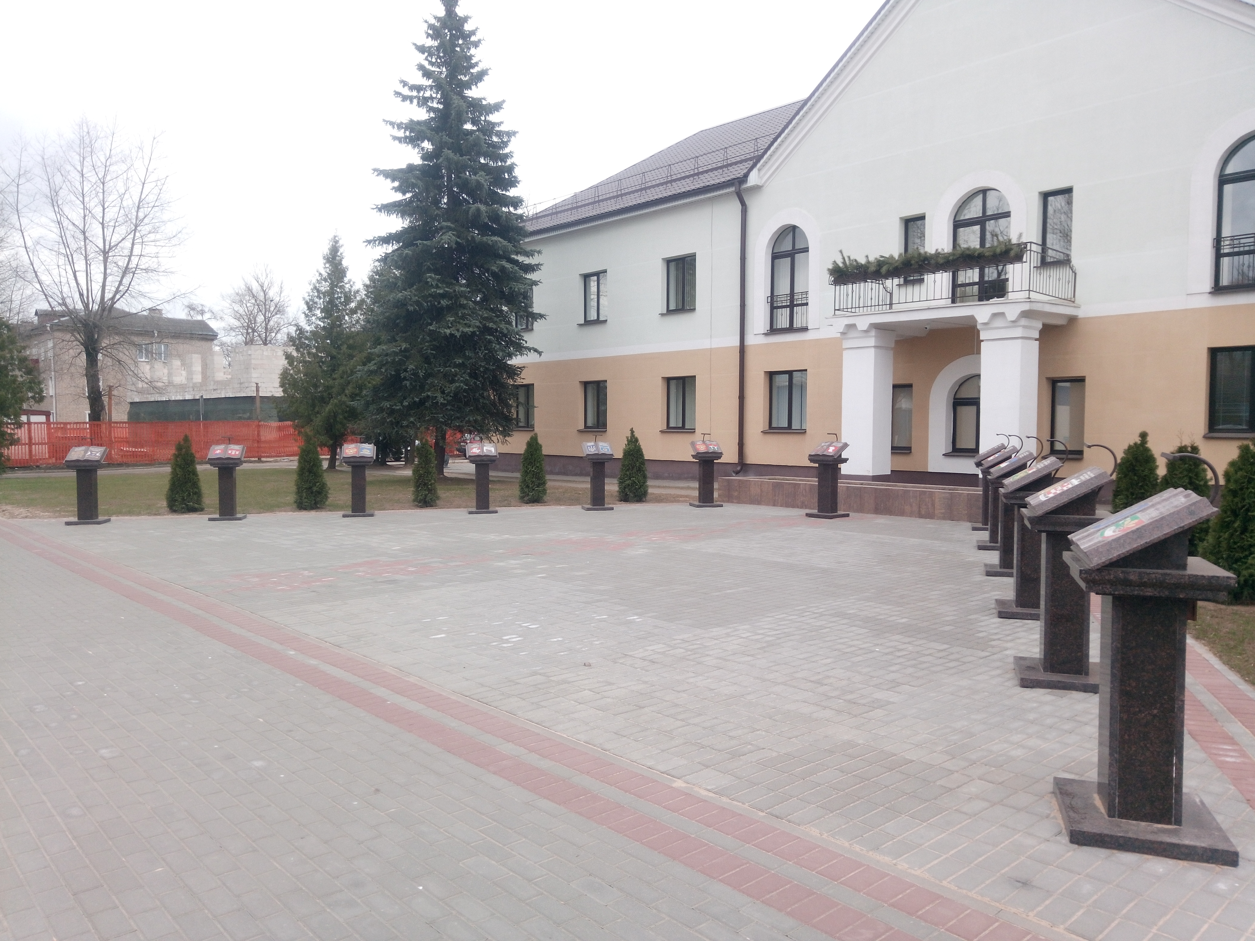 Гарады-пабрацімы.